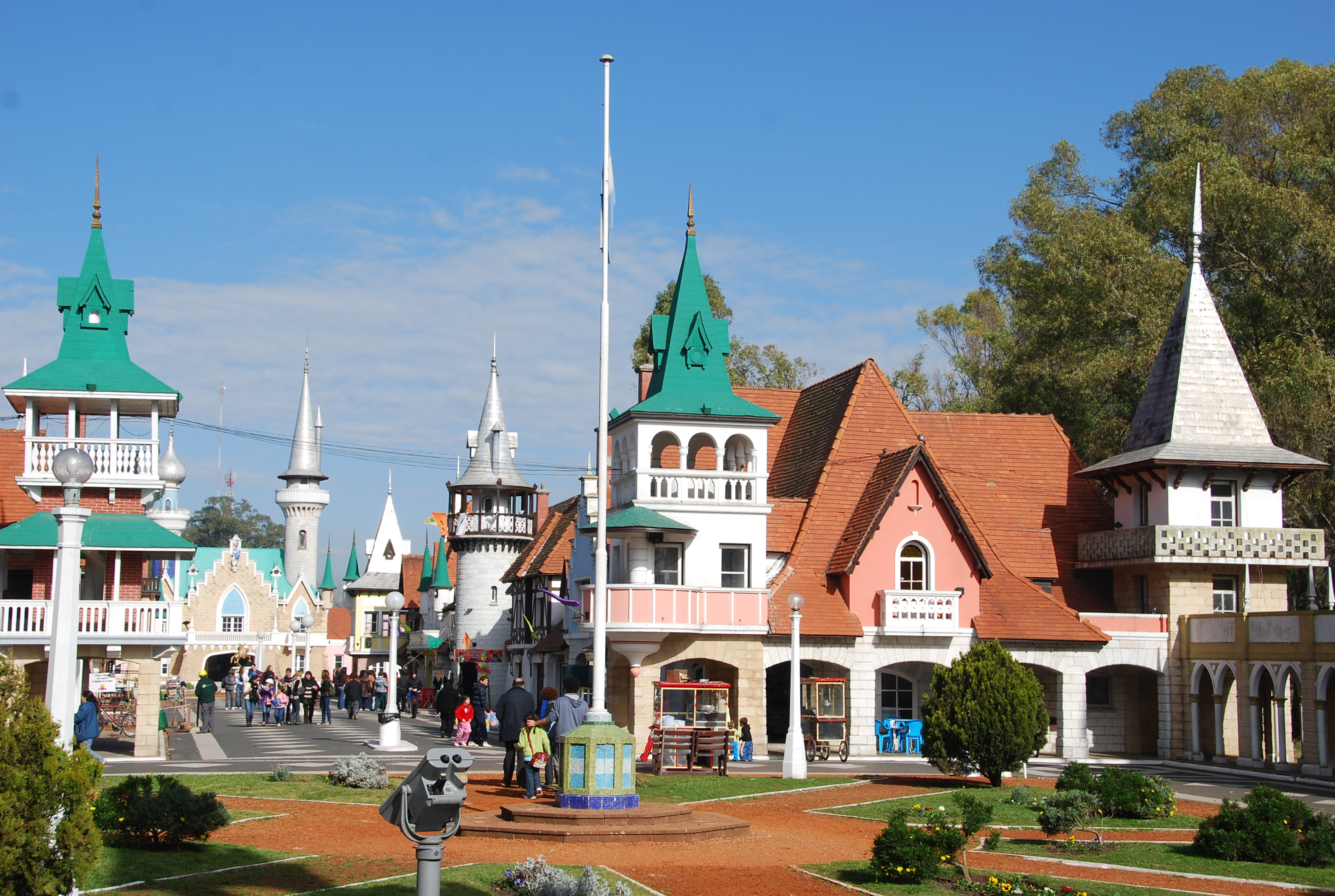 República de los Niños